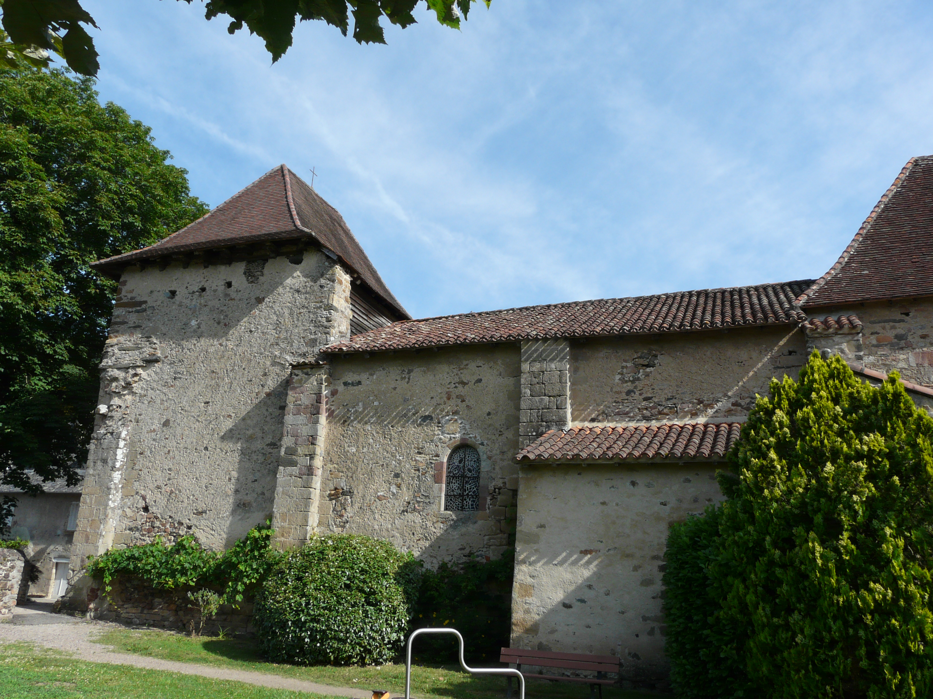 L'église Saint-Pierre de Brivezac, Corrèze, France.